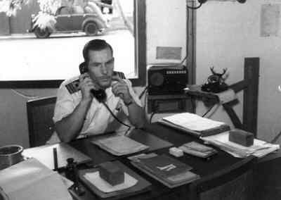 Jan Willem Hees (1913-1989), een Nederlands marineofficier en acteur, als eerste officier op MVK Morokrembangan bij Soerabaja.